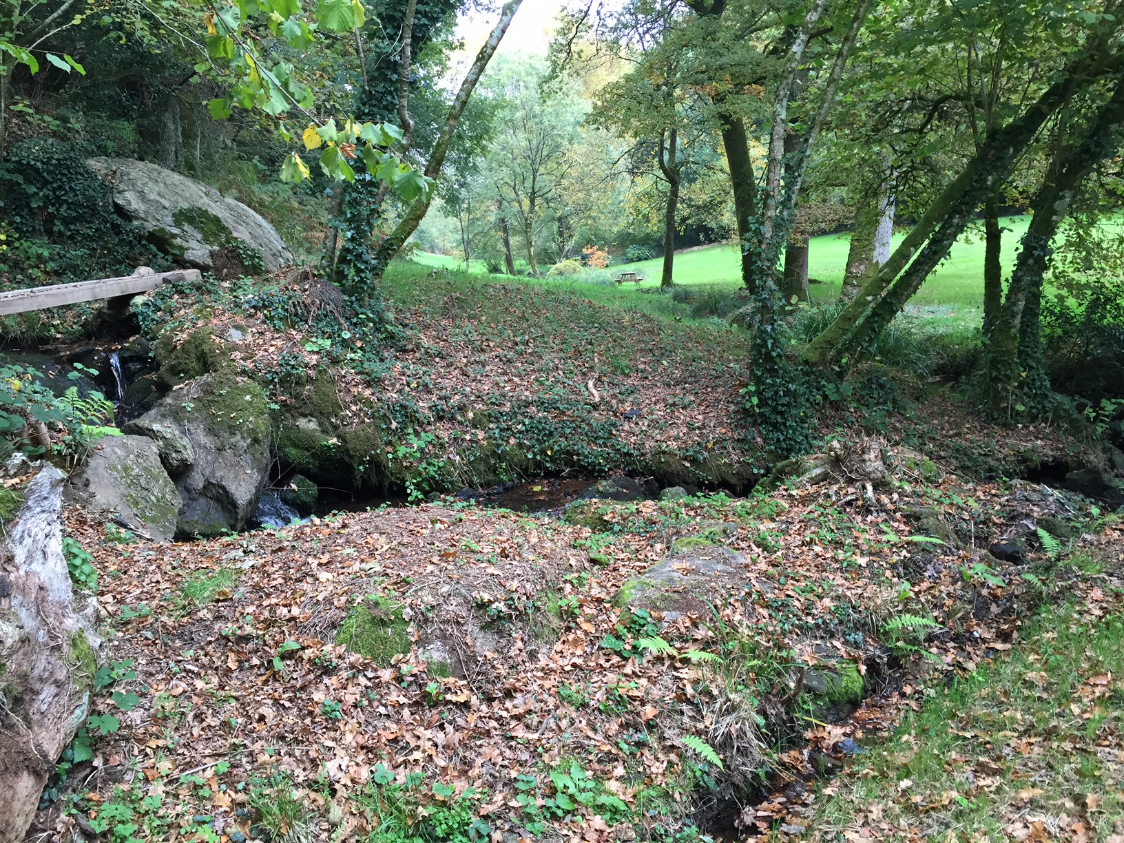 Vue du parc du Domaine de Mane er Hoet